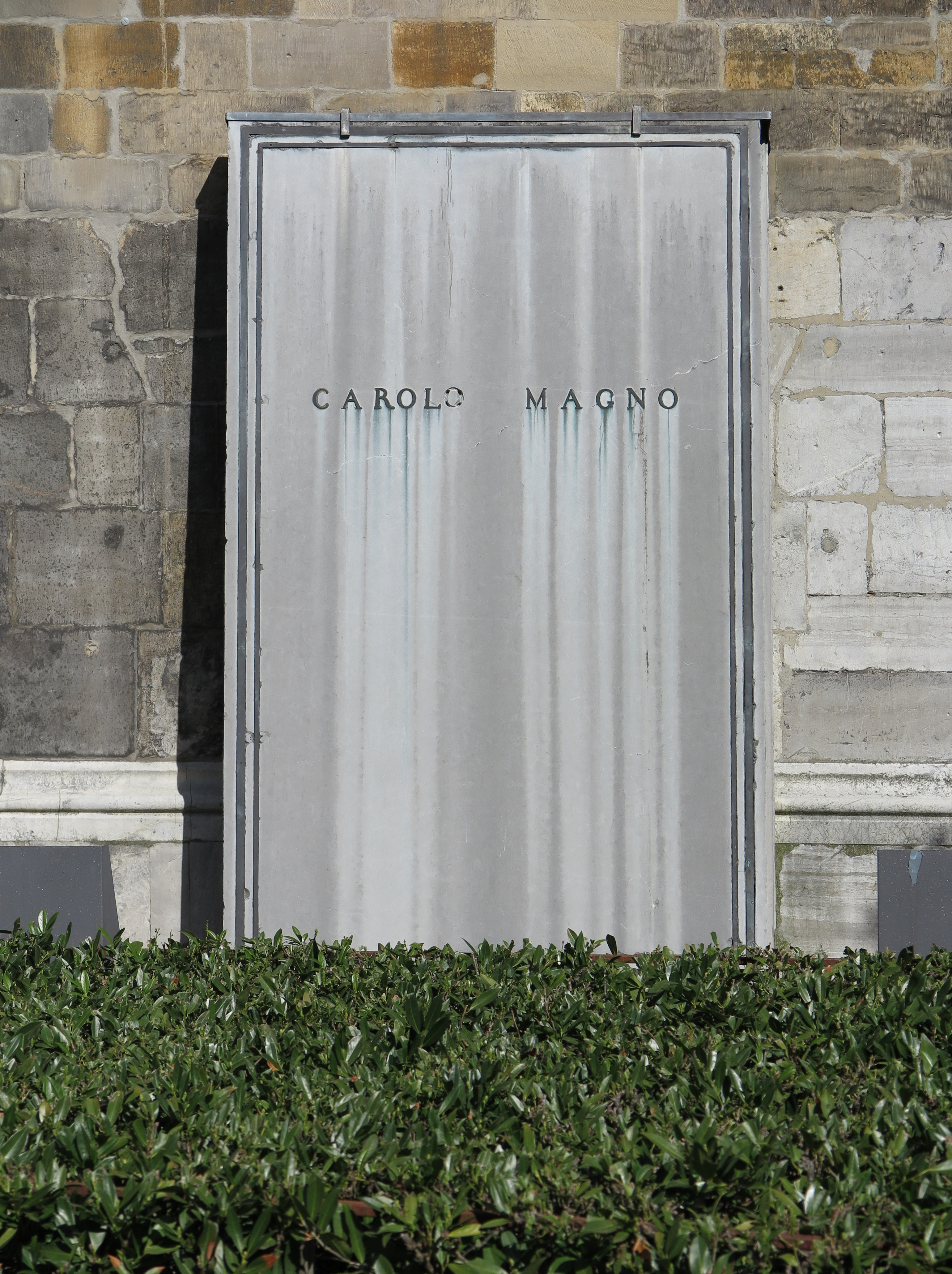 Grabplatte von Bischof Marc-Antoine Berdolet für Karl den Großen (Carolo Magno) an der südliche Seite der Chorhalle des Aachener Doms. Da das Grab Karls nicht mehr lokalisiert werden konnte, ließ Bischof Berdolet 1804 symbolisch eine Grabplatte in der Mitte des Oktogons plazieren. Diese Grabplatte wurde 1911 wieder entfernt.